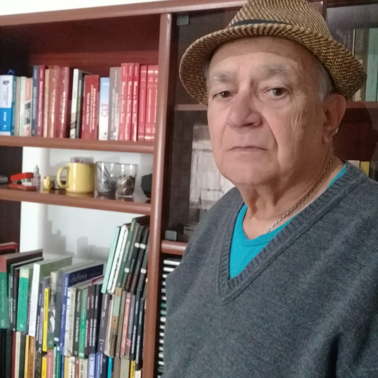 Importante escritor policial brasileiro.